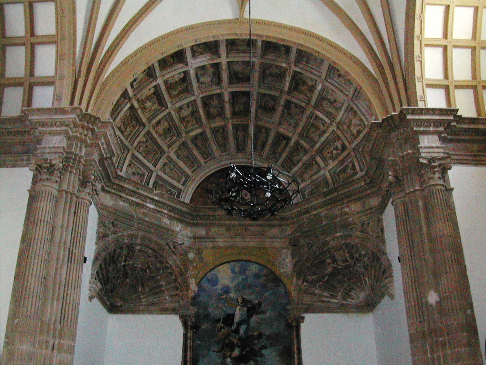 Bóveda de cuarto de esfera que corona el presbiterio de la iglesia del Antiguo Convento de Santo Domingo de La Guardia de Jaén.